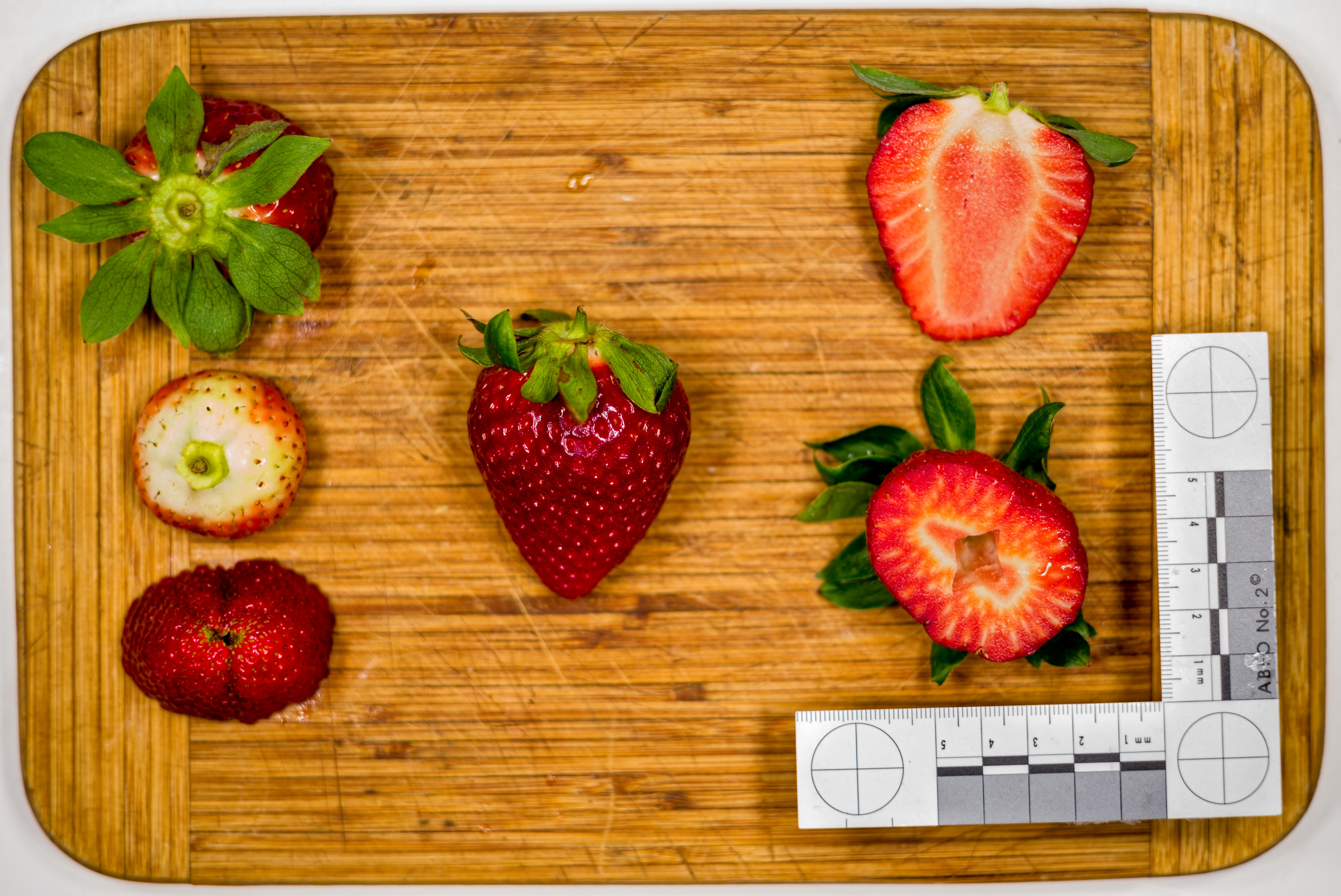 Erdbeeren